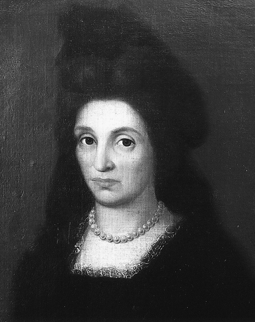 Anna Colbjørnsdatter